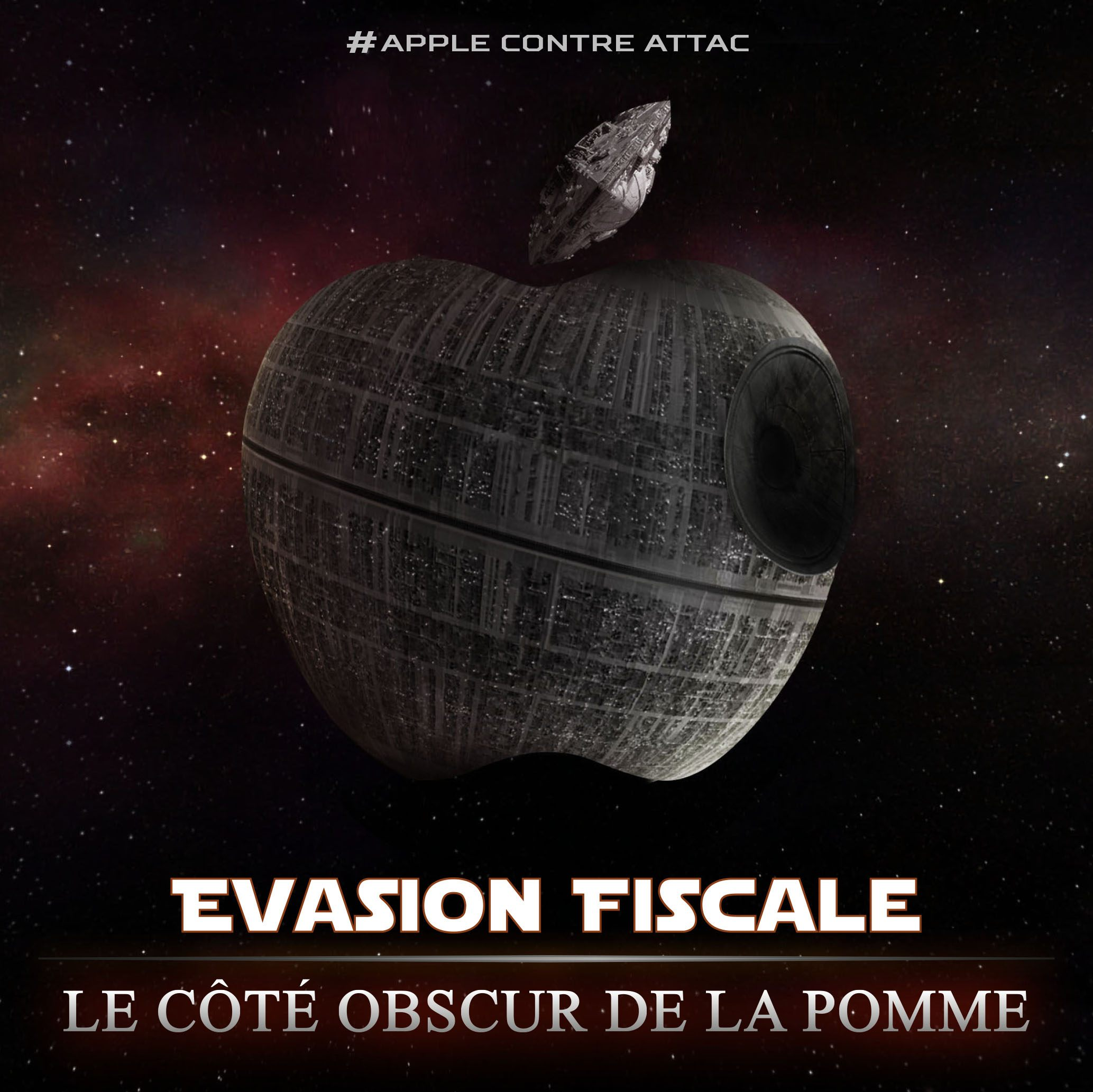 Affiche de l'association Attac qui, dans le cadre de sa campagne dénonçant l'évasion fiscale pratiquée par Apple, est poursuivie en justice par l'entreprise. Ce visuel est une parodie d'affiche du film Star Wars, le mot dièse en haut faisant référence à l'épisode V : L'Empire contre-attaque, le logo d'Apple (une pomme) est transformé en Étoile de la mort, En bas, le sous-titre évoque, toujours en référence au film, le côté moins connu mais néanmoins puissant de la multinationale.